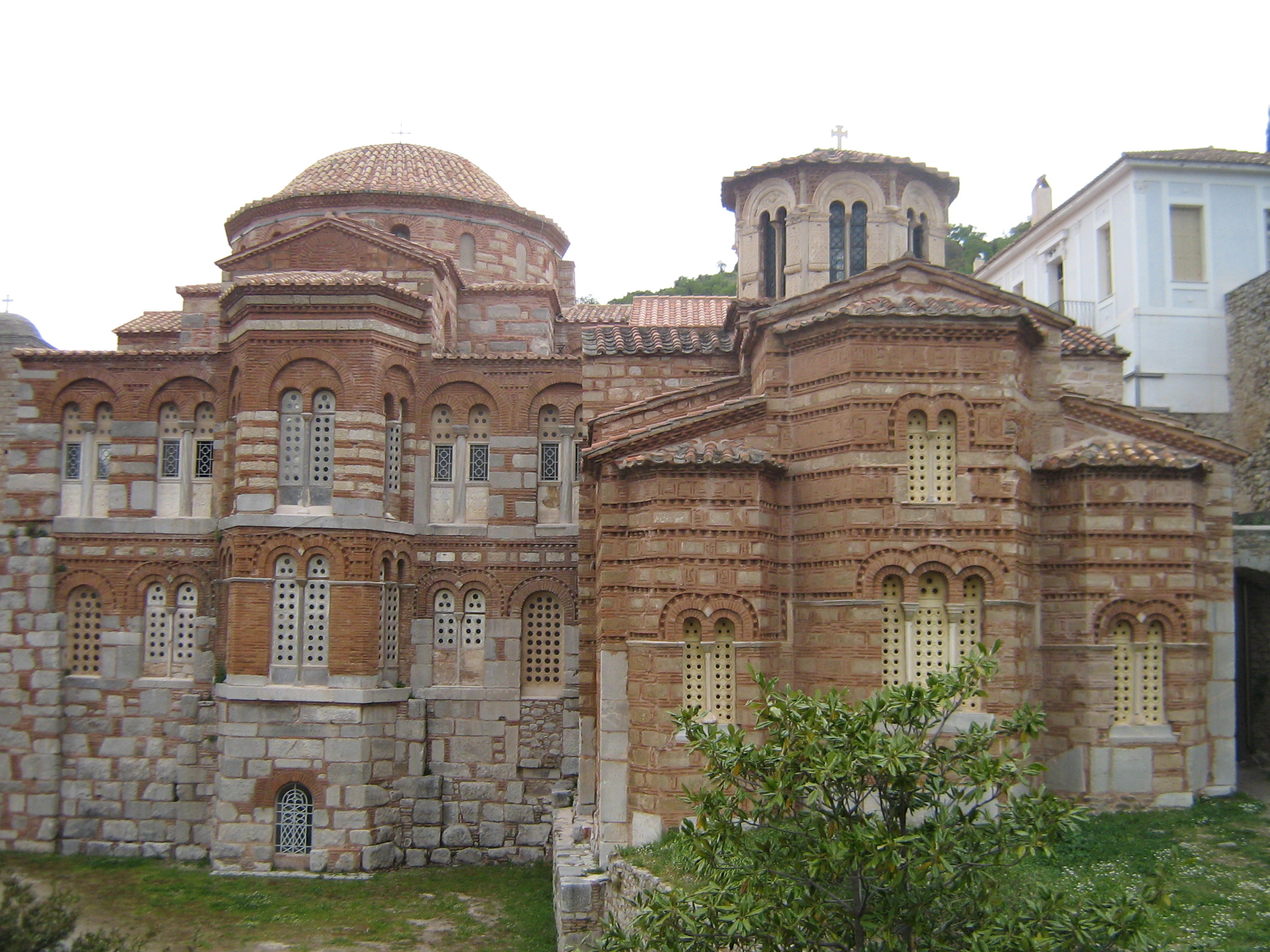 Καθολικό μονής Οσίου Λουκά«Καθολικό μονής Οσίου Λουκά»